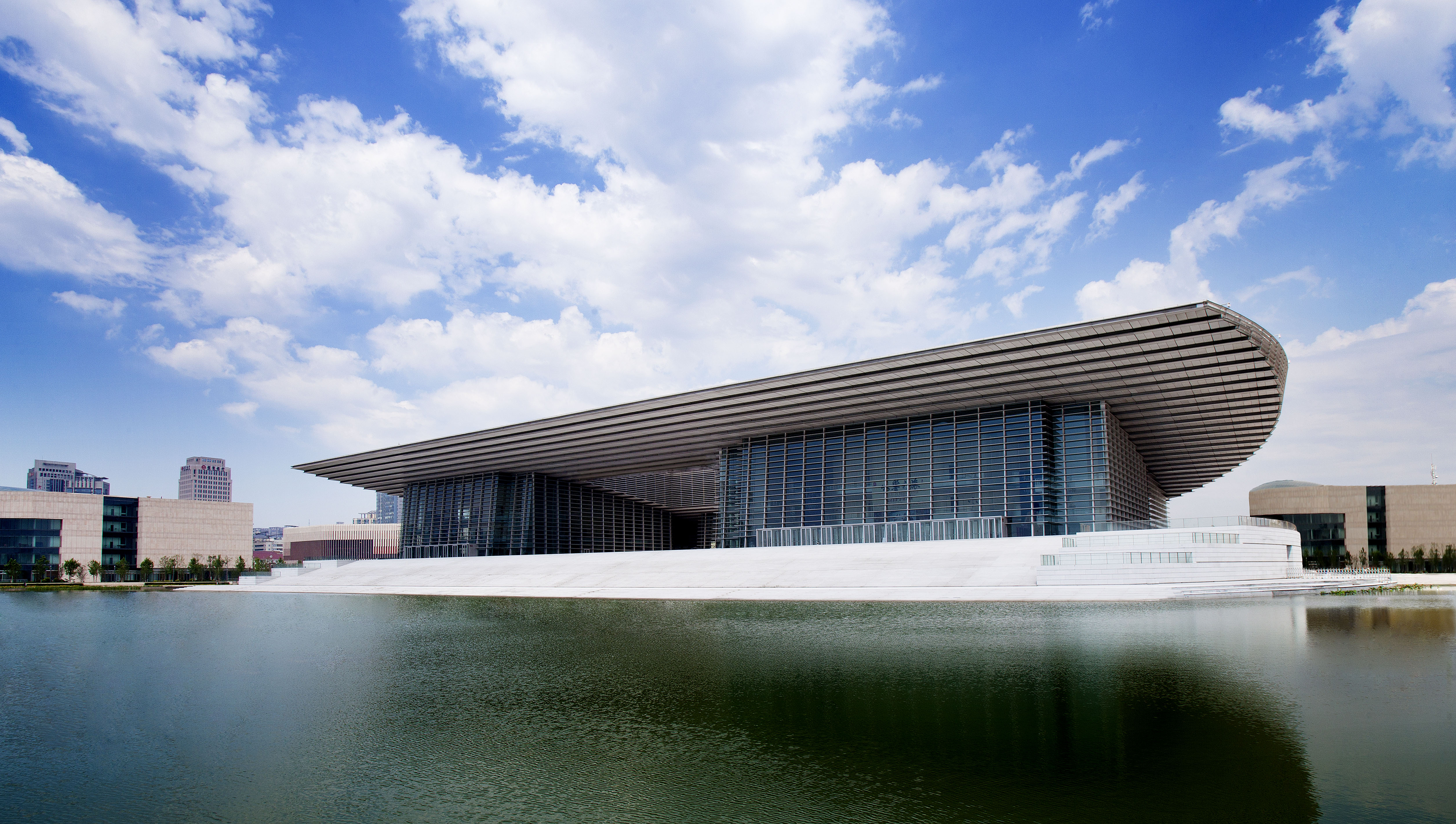 中文（中国大陆）: 天津大剧院全景